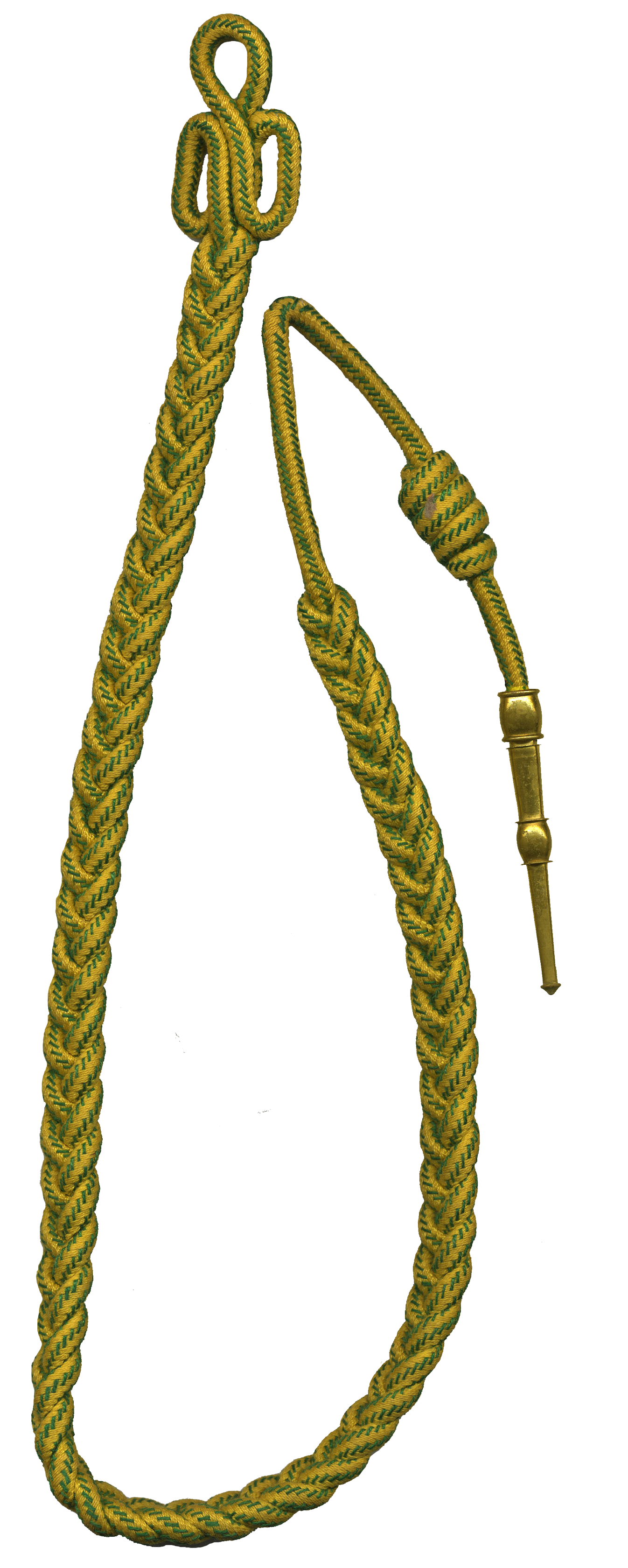 Fourragère aux couleurs de la Médaille militaire française